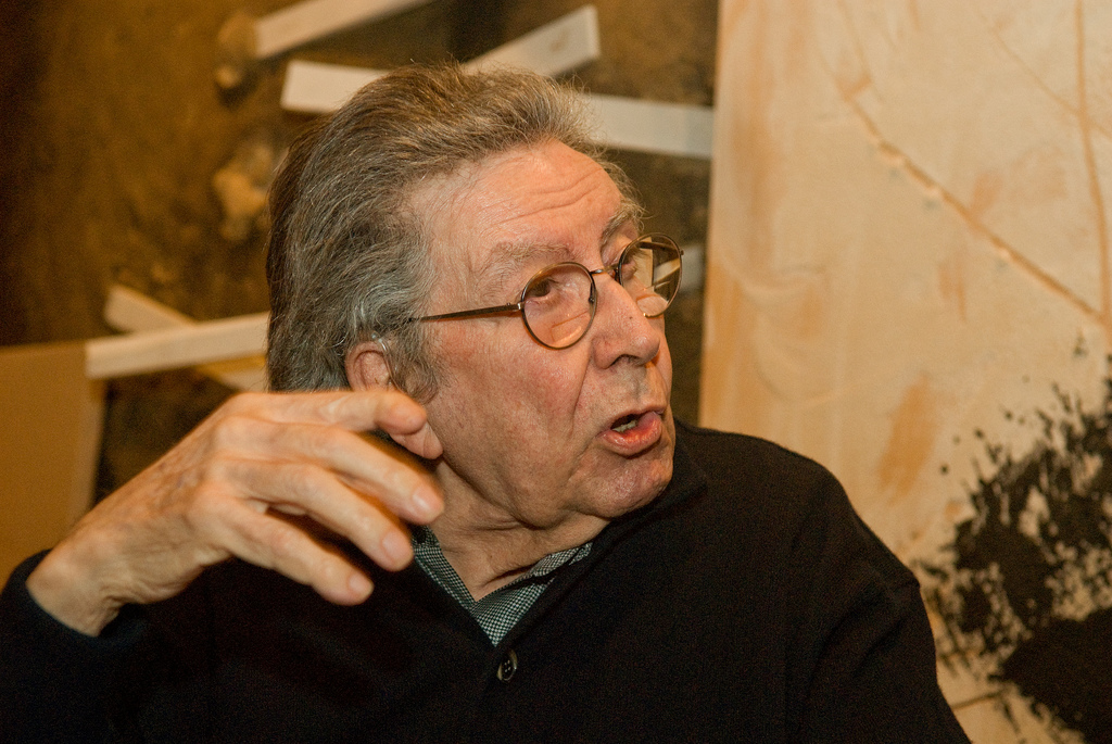 Antoni Tàpies i la fundació IDIBELL (feb-2008)